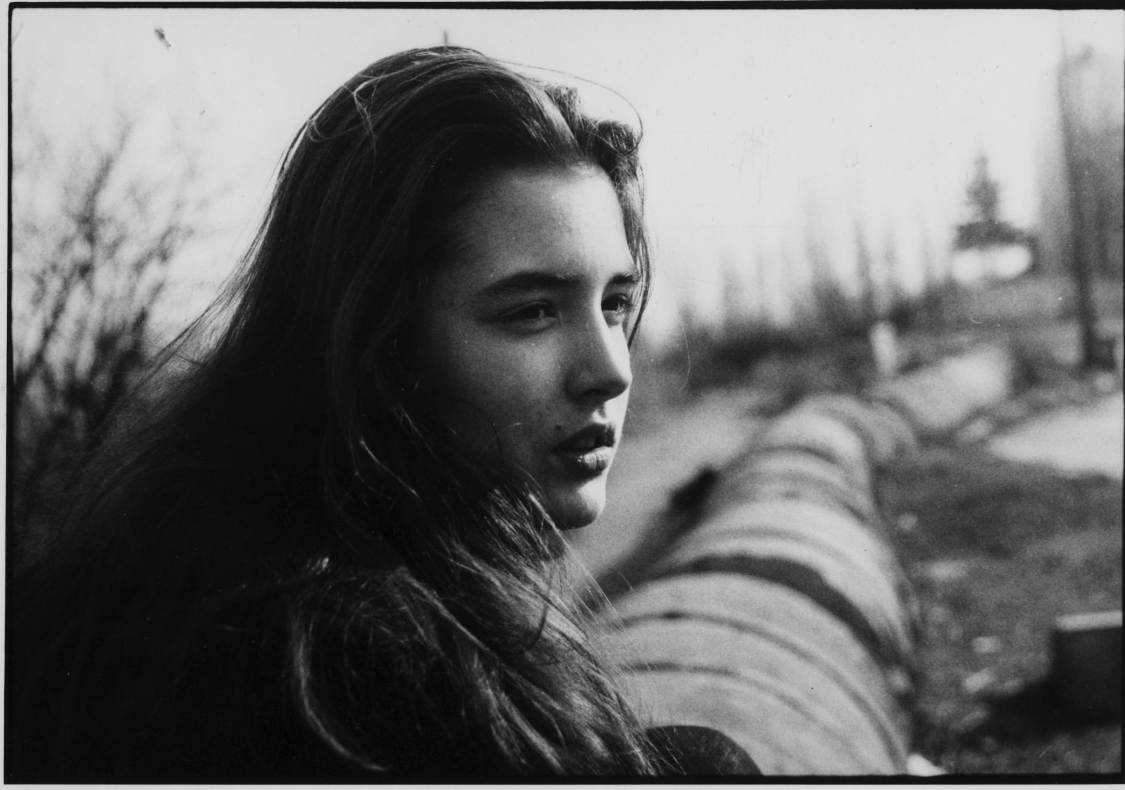 Barbara Kosmal - Polish actress and model